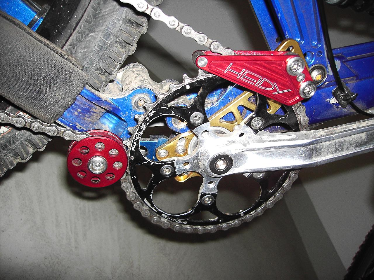 Kettenführung